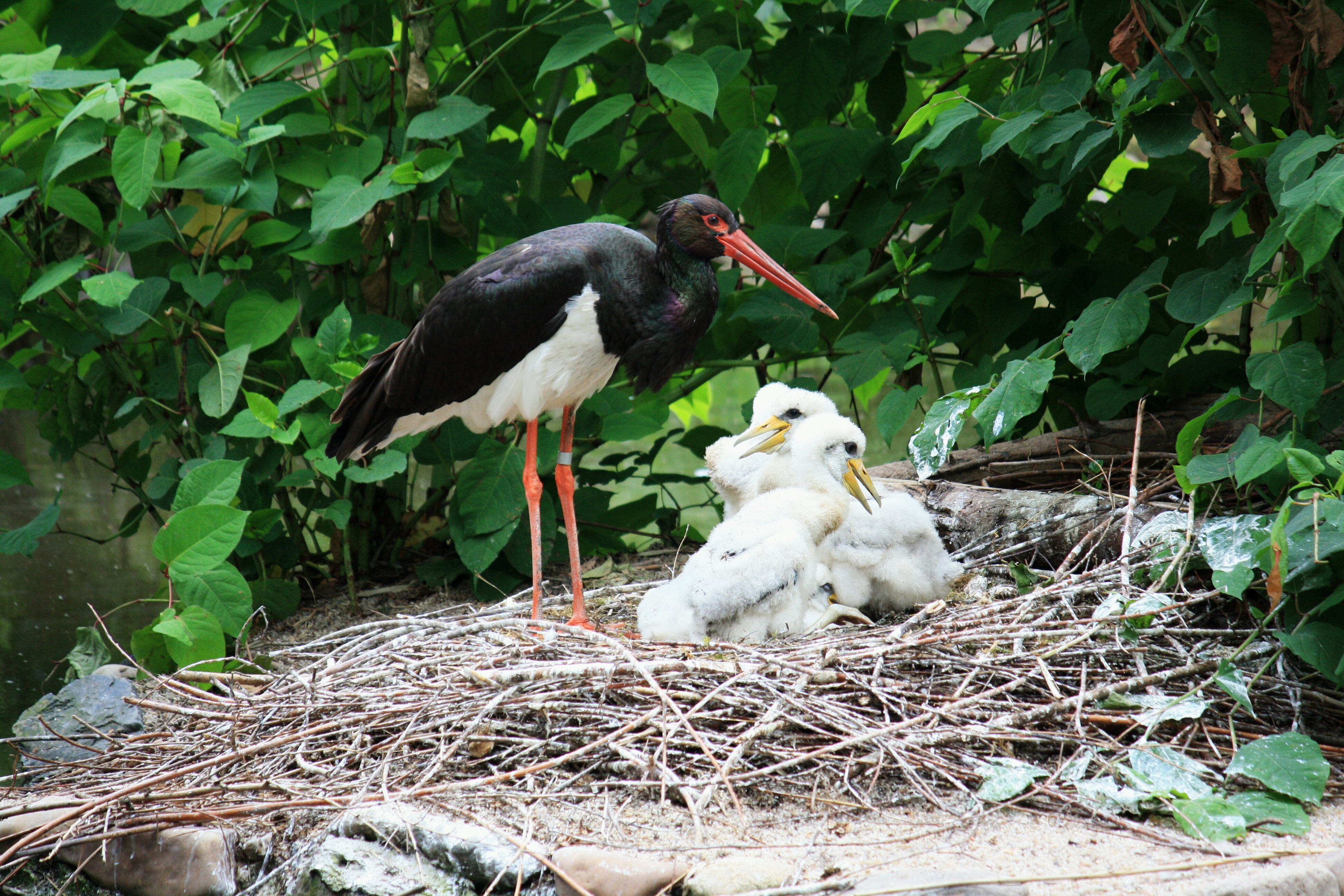 Čáp černý v Pražské Zoo